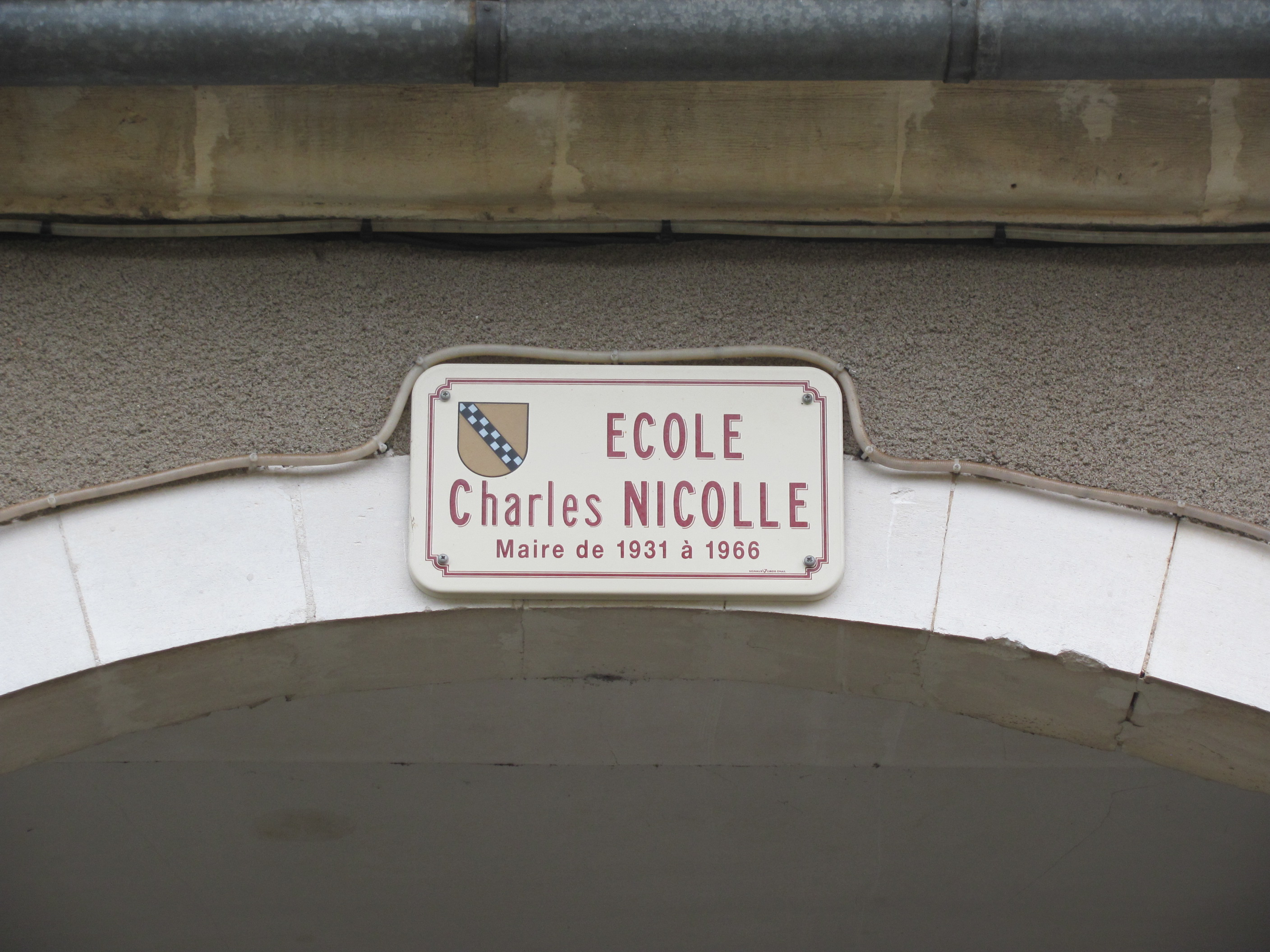 L'école Charles-Nicolle à Sougères-en-Puisaye.